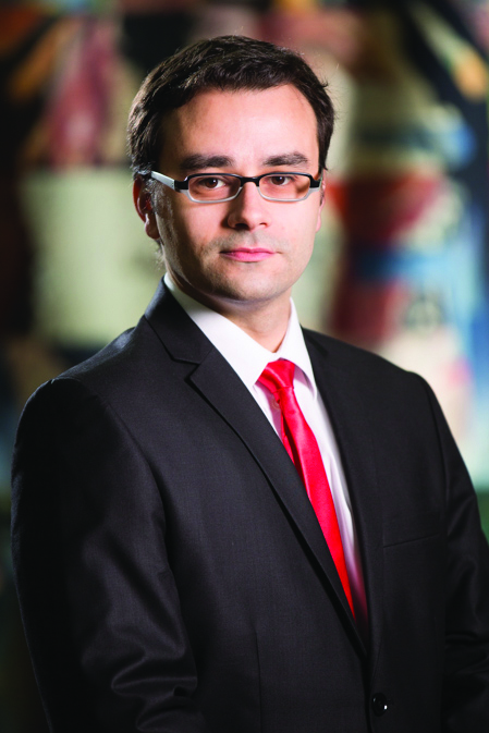 Илија Јованов